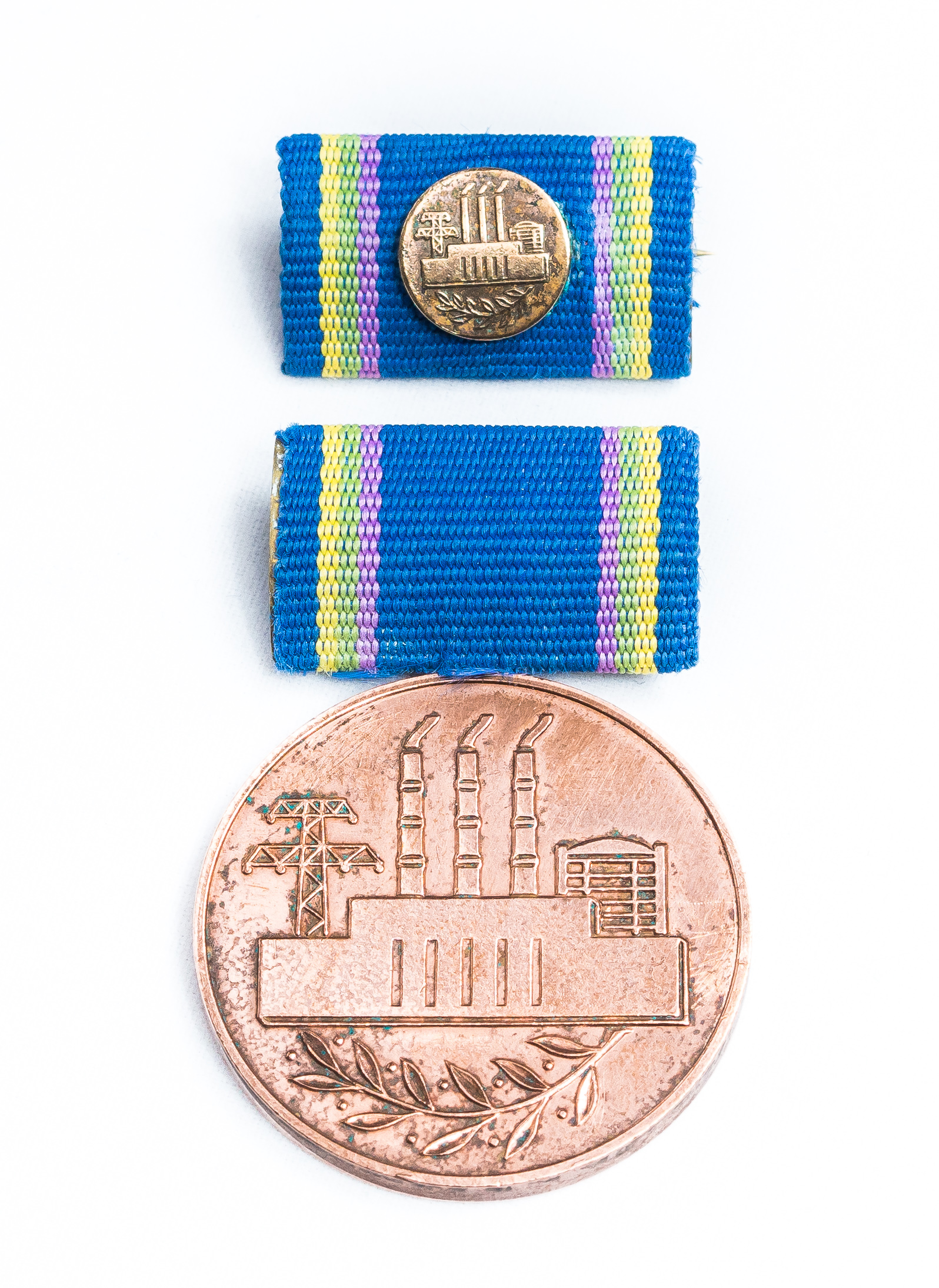 Avers mit Spange und Interimsspange